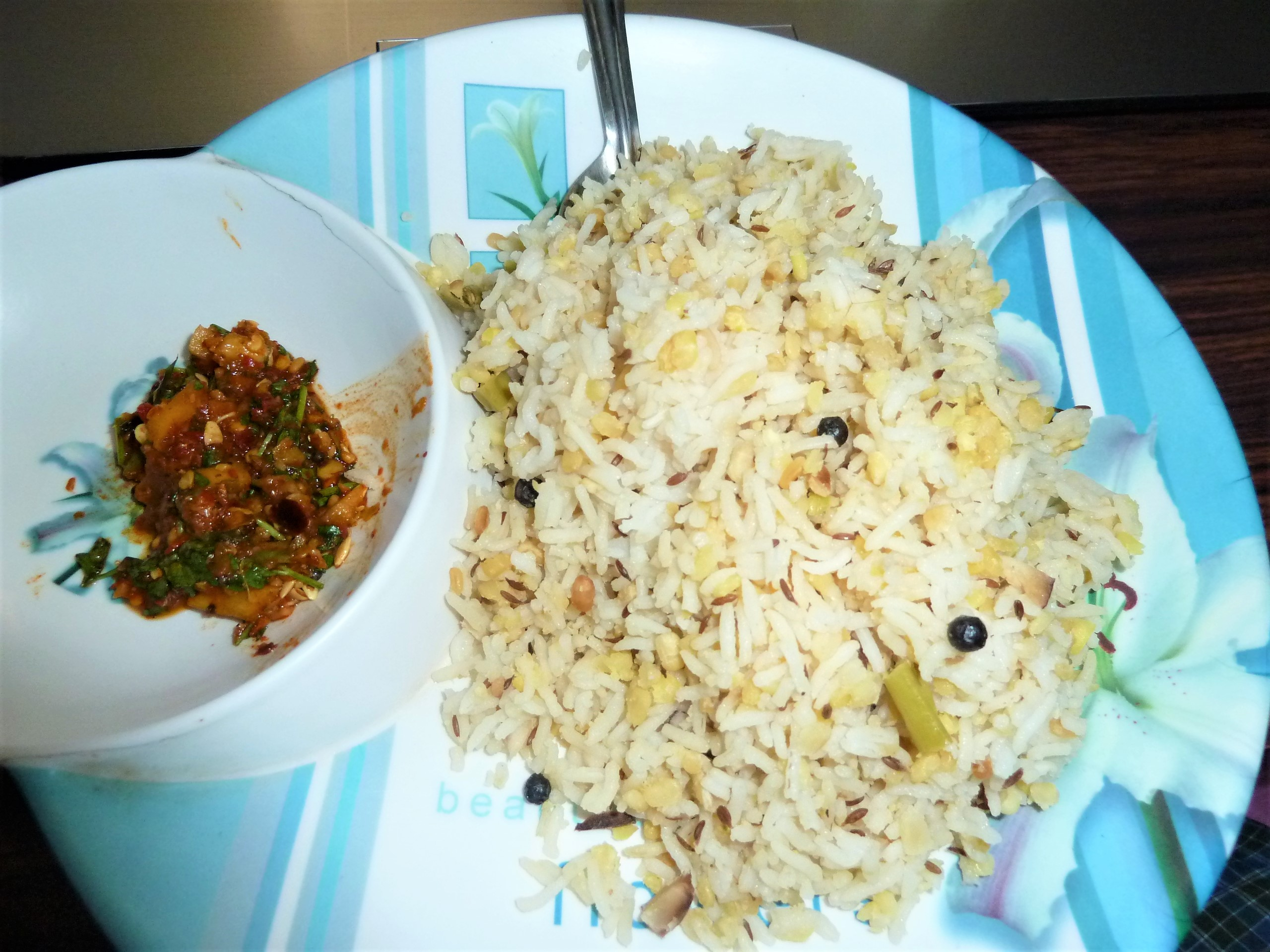 కట్టు పొంగలి